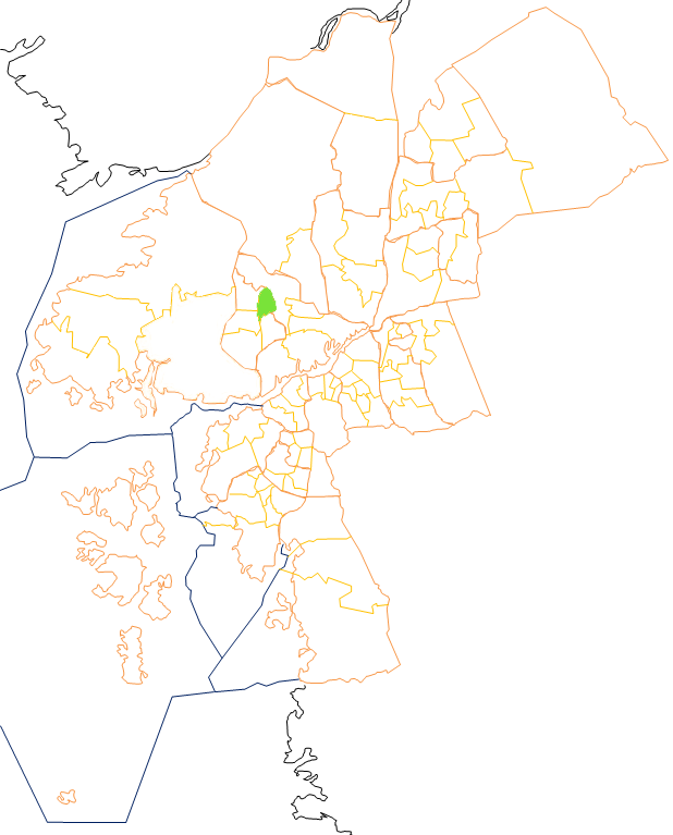 Karta som visar primärområdes belägenhet i Göteborg